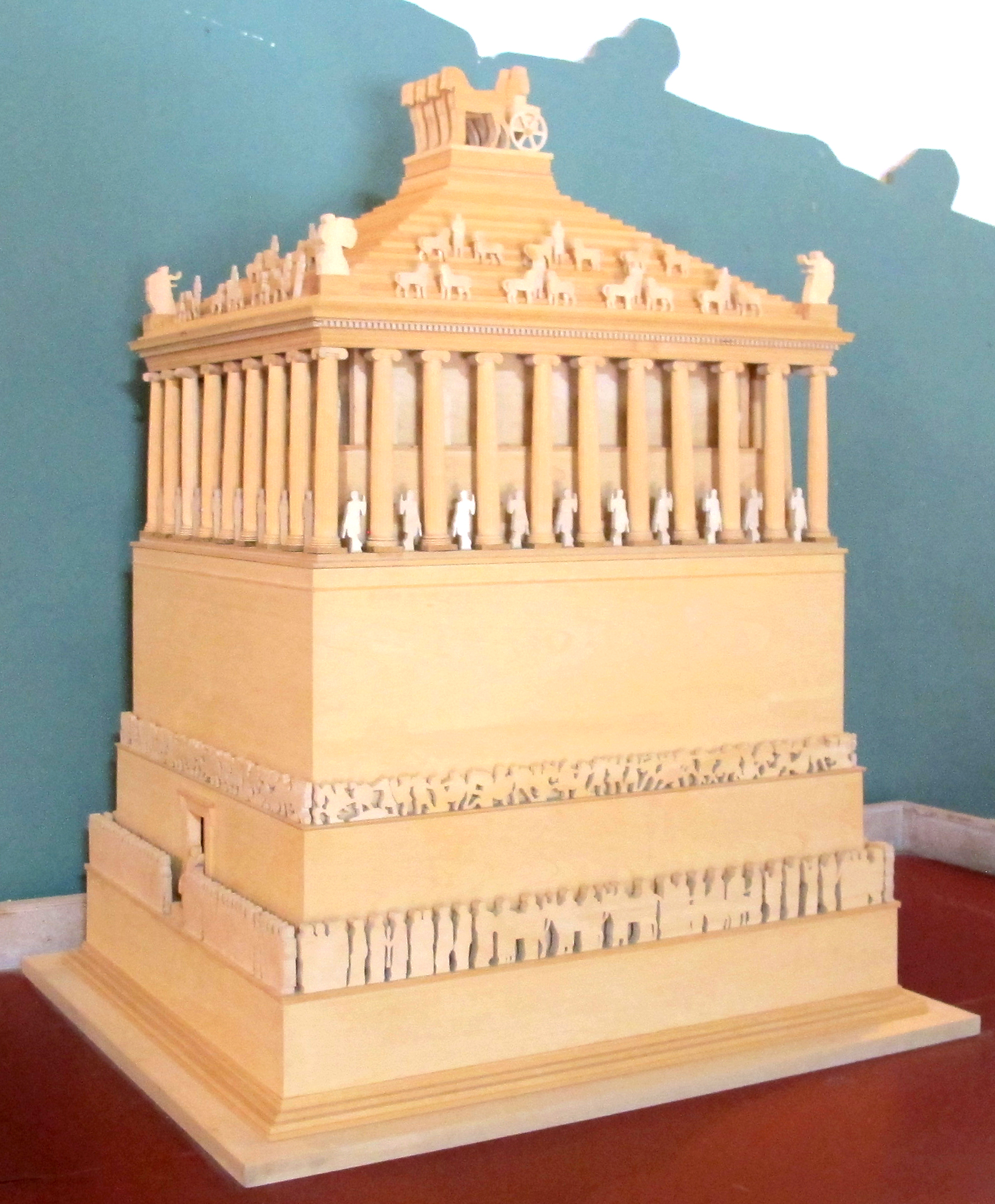 Mausoleo di alicarnasso, ricostruzione